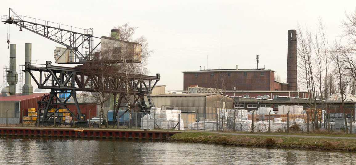 Johnson Controls Gelände in Hannover